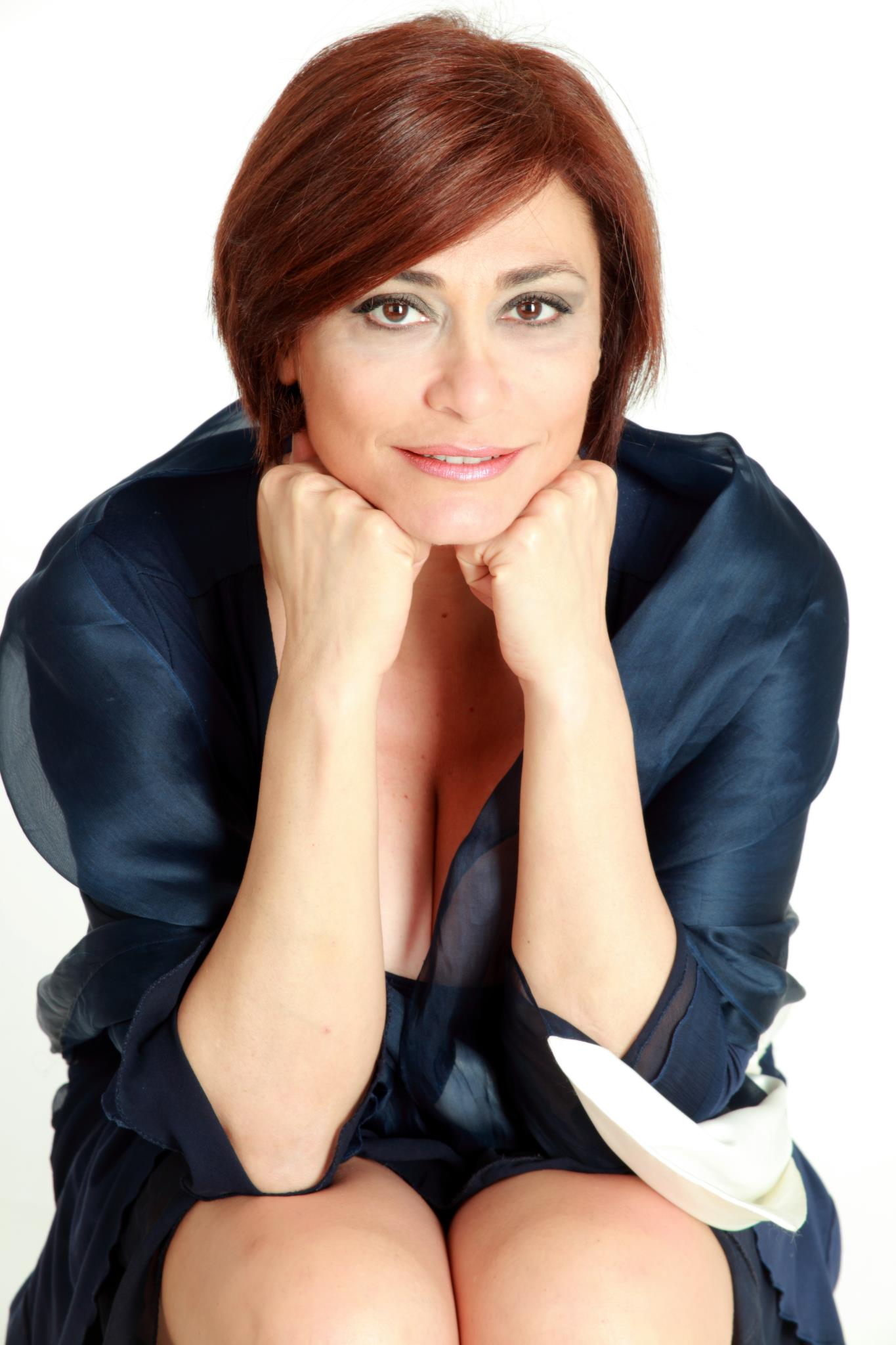 l'attrice Anna Rita Del Piano